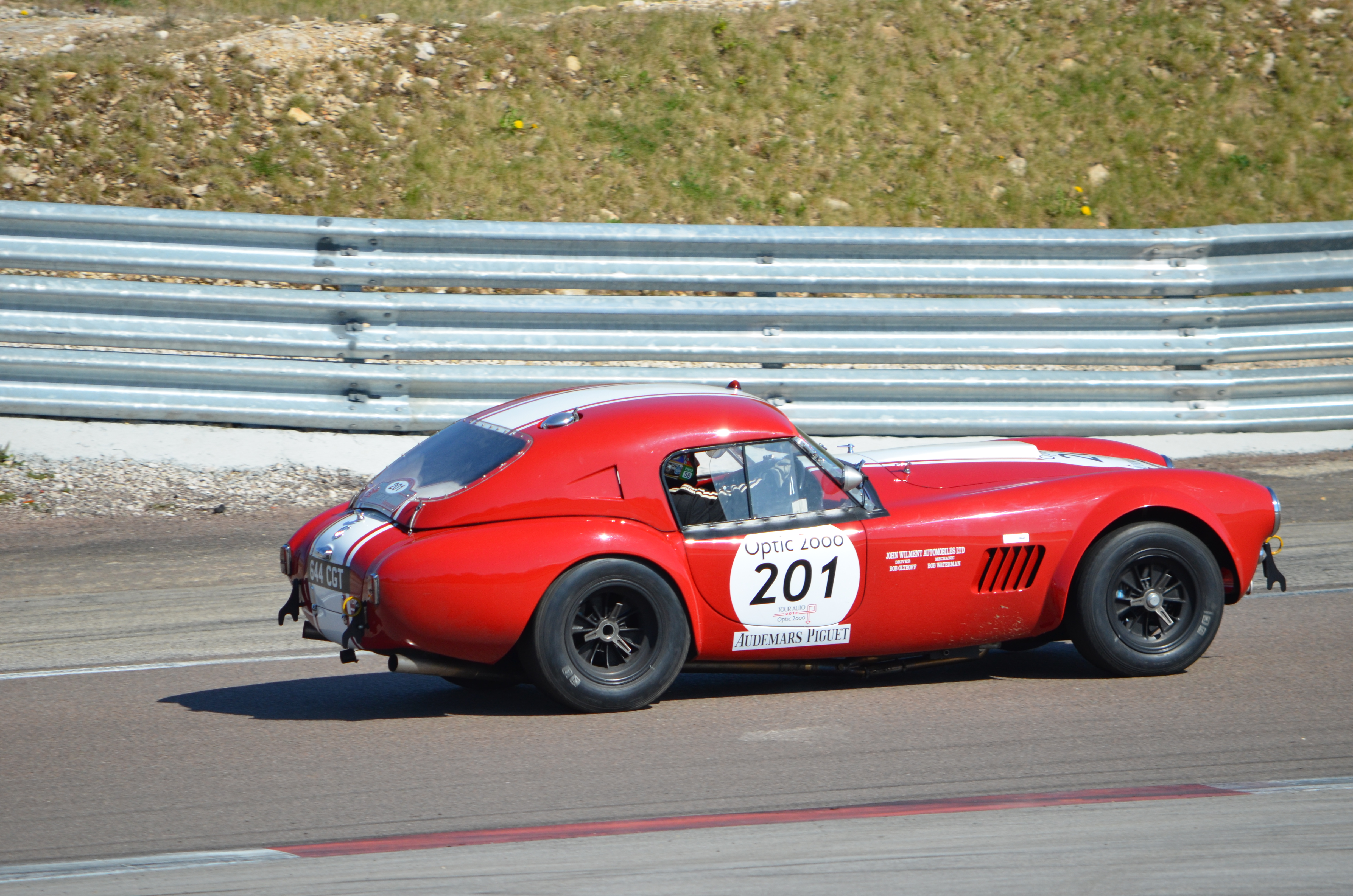 AC Cobra, numéro 201, Tour Auto 2012, étape sur le Circuit de Prenois.